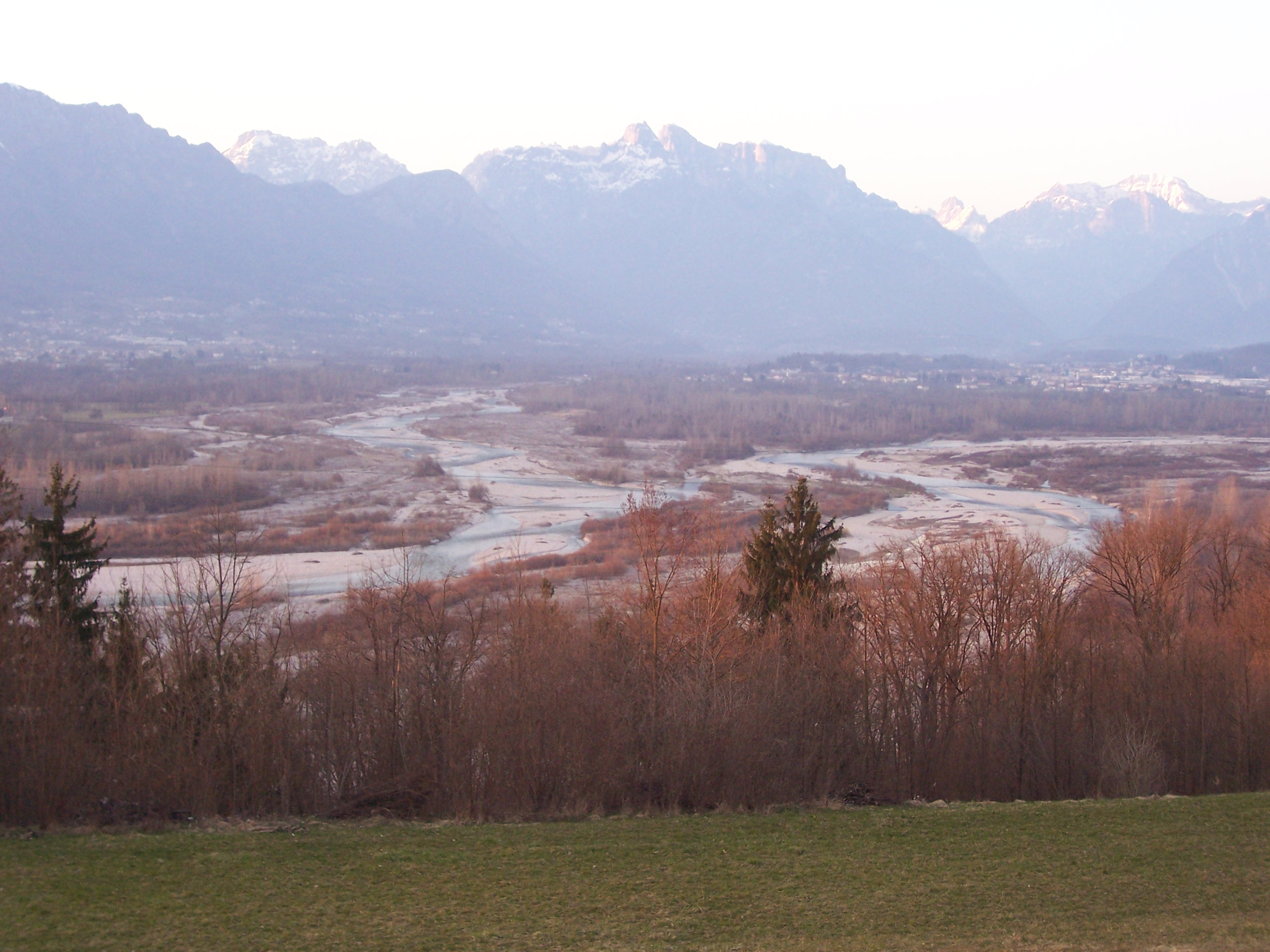 Confluenza del fiume Cordevole (a sinistra nella foto) con il fiume Piave (a destra) come visibile dal comune di Mel in provincia di Belluno. I Monti del Sole sono sullo sfondo.